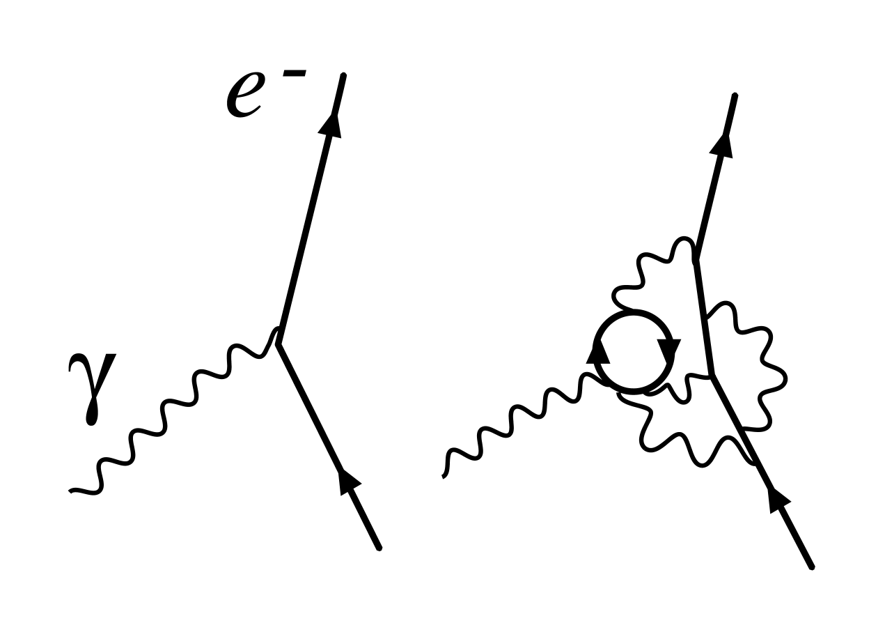 Renormalization in QED